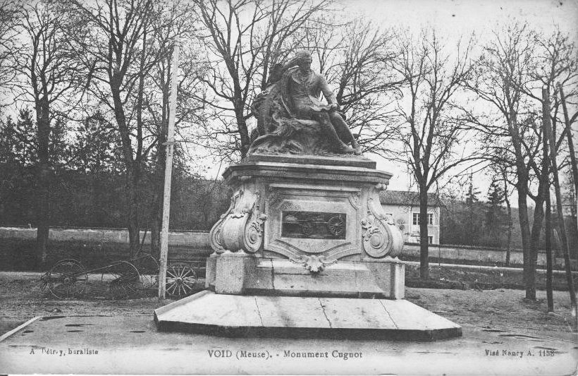 Carte postale ancienne montrant le monument Nicolas-Joseph Cugnot à Void-Vacon avant la 2ème guerre mondiale. La statue a été démontée par les troupes allemandes et remplacée après la guerre par un obélisque